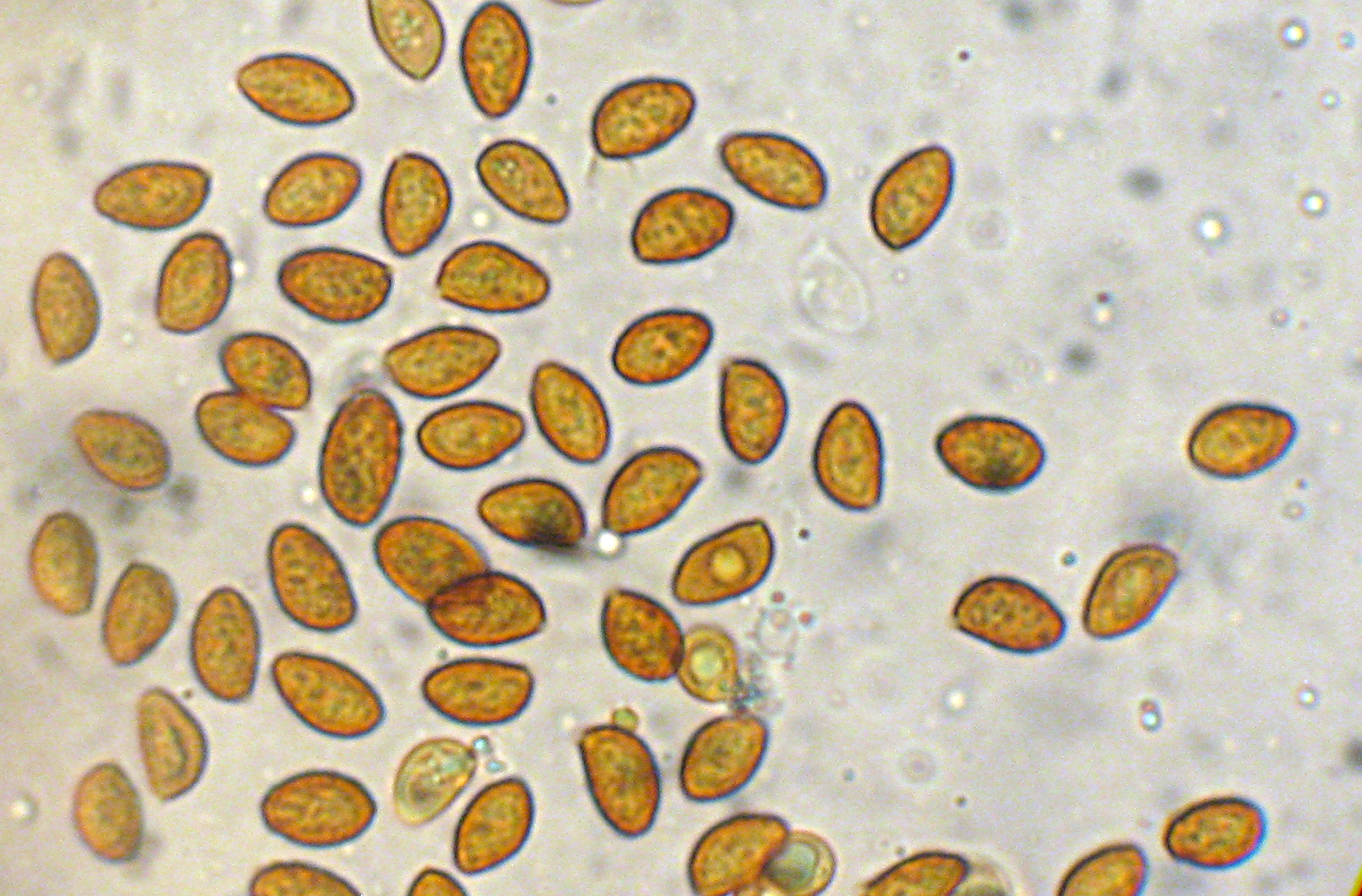 Gymnopilus penetrans (Fr.) Murrill